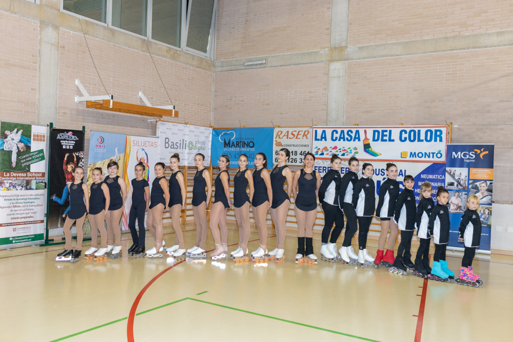 Club patinaje Siluetas Elche